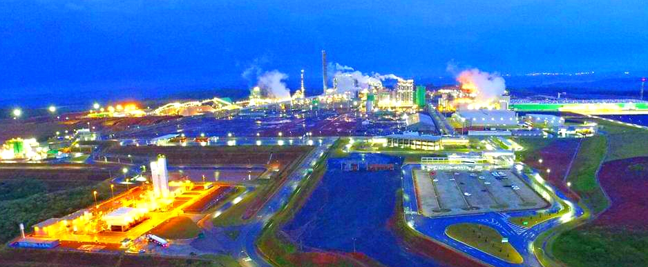 Complexo industrial da Klabin, Unidade Puma, em Ortigueira, no Paraná.